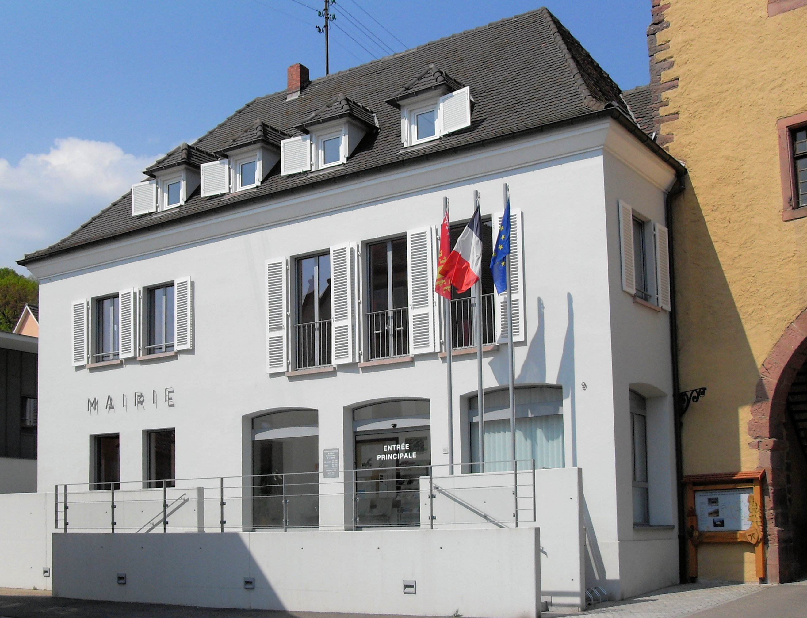 La mairie de Wihr-au-Val